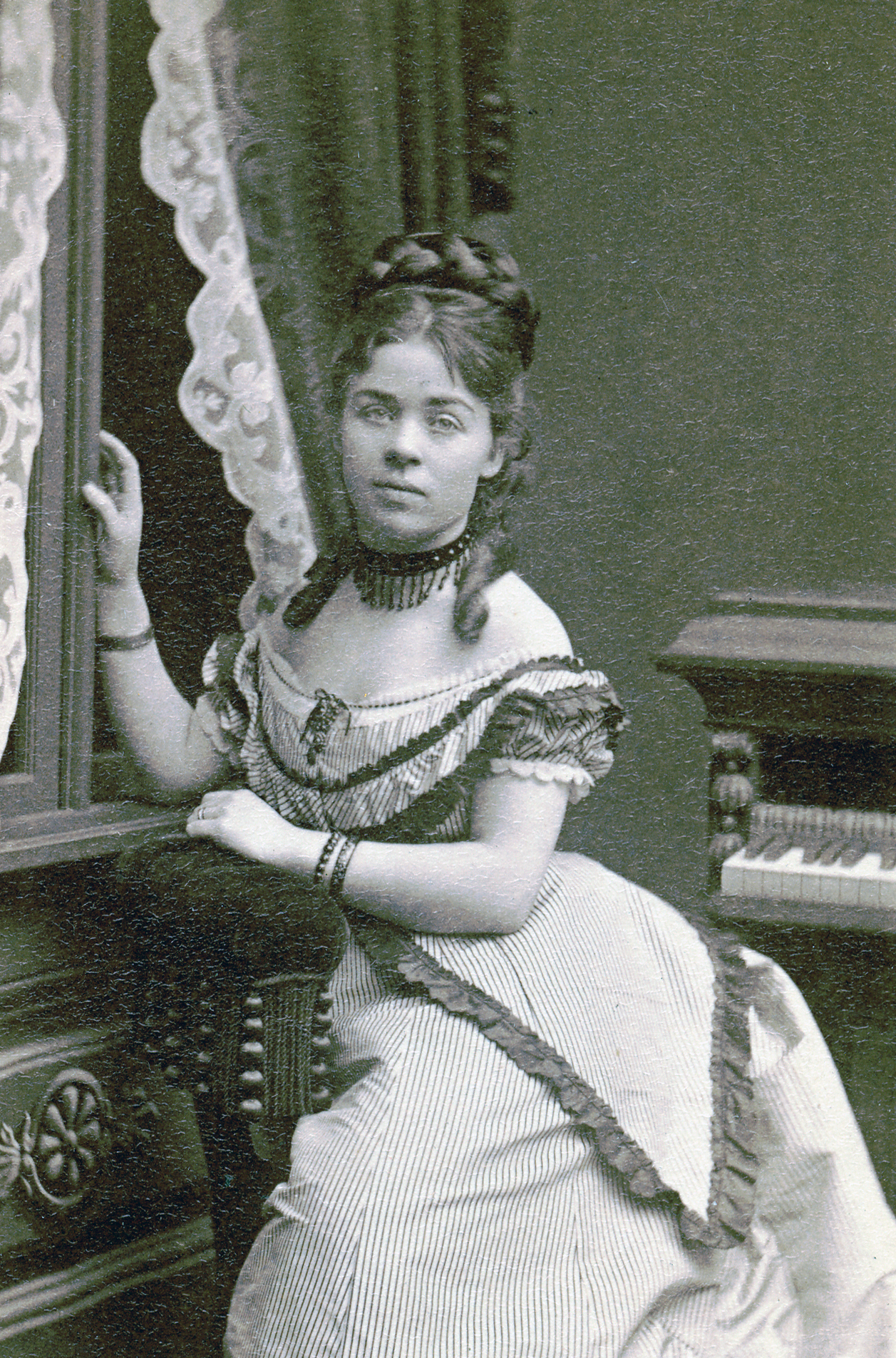 Amalia Riégo, sångare vid Kungliga Operan 1874